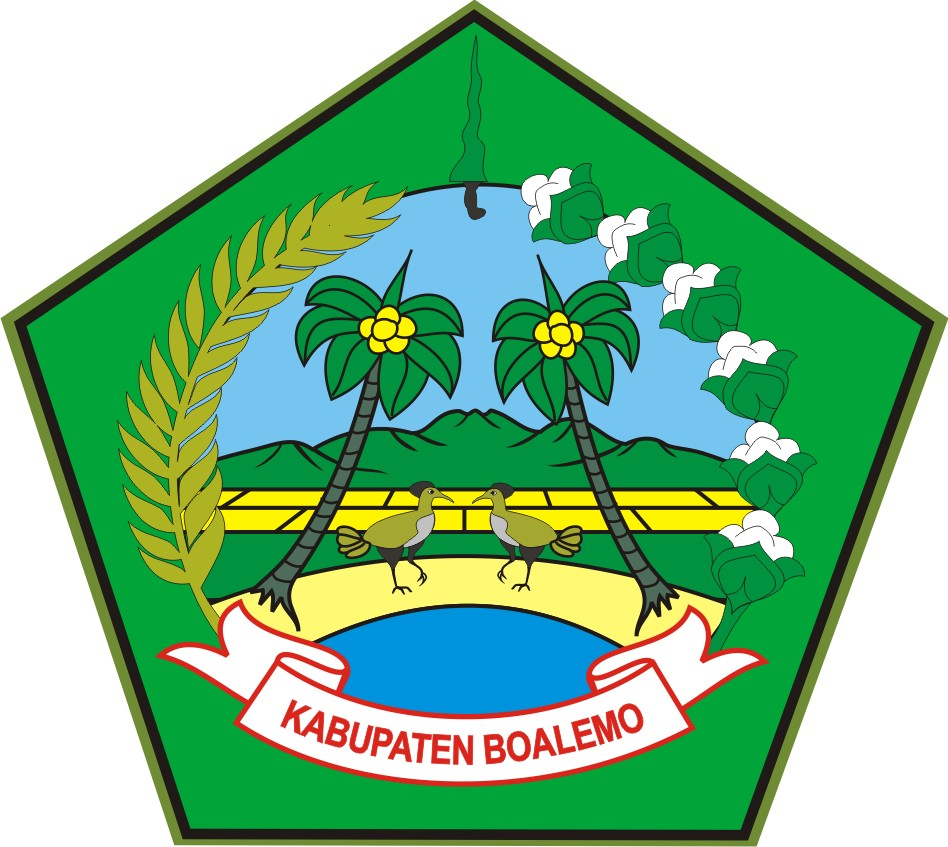 Boalemo